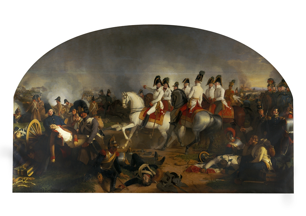 Erzherzog Karl mit seinem Stab in der Schlacht bei Aspern am 22. Mai 1809, Gemälde von Johann Peter Krafft (1780–1856).